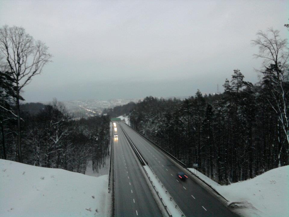 Gdynia - Lasy Chylońskie (kładka nad Trasą Kwiatkowskiego)